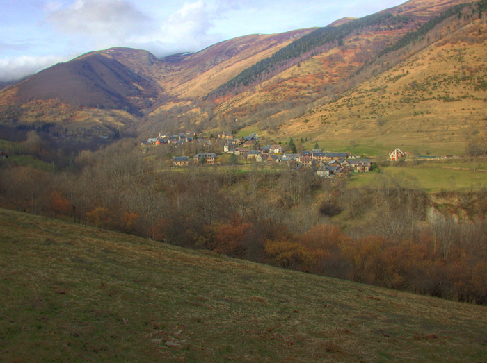 Saint-Paul-d'Oueil, Haute-Garonne, France. Février 2008. Image HDR, Photomatix, 3 expositions -1/0/+1